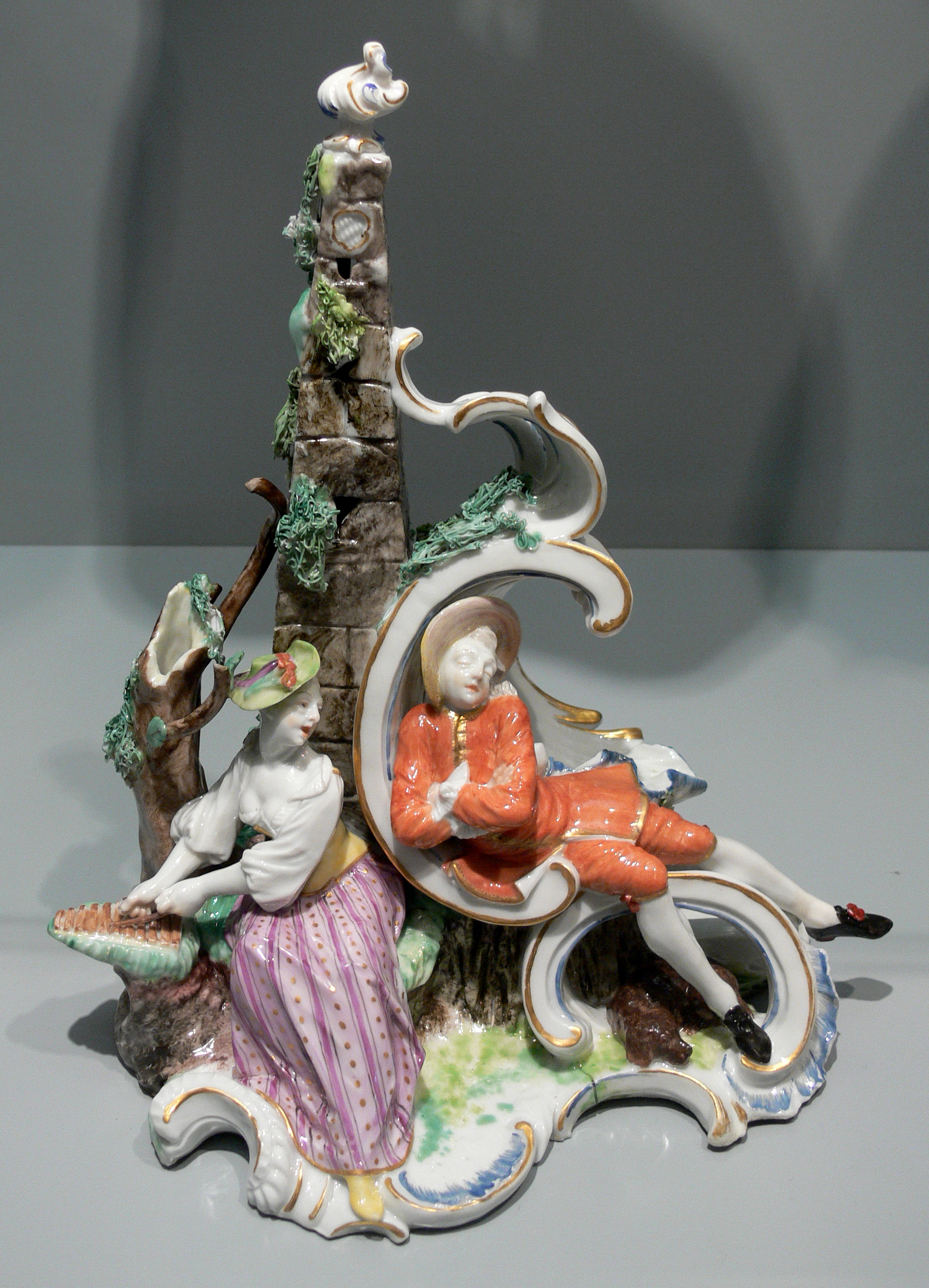 Franz Anton Bustelli: Liebesgruppe „Der gestörte Schläfer“, um 1756 Porzellanmanufaktur Nymphenburg Bayerisches Nationalmuseum München